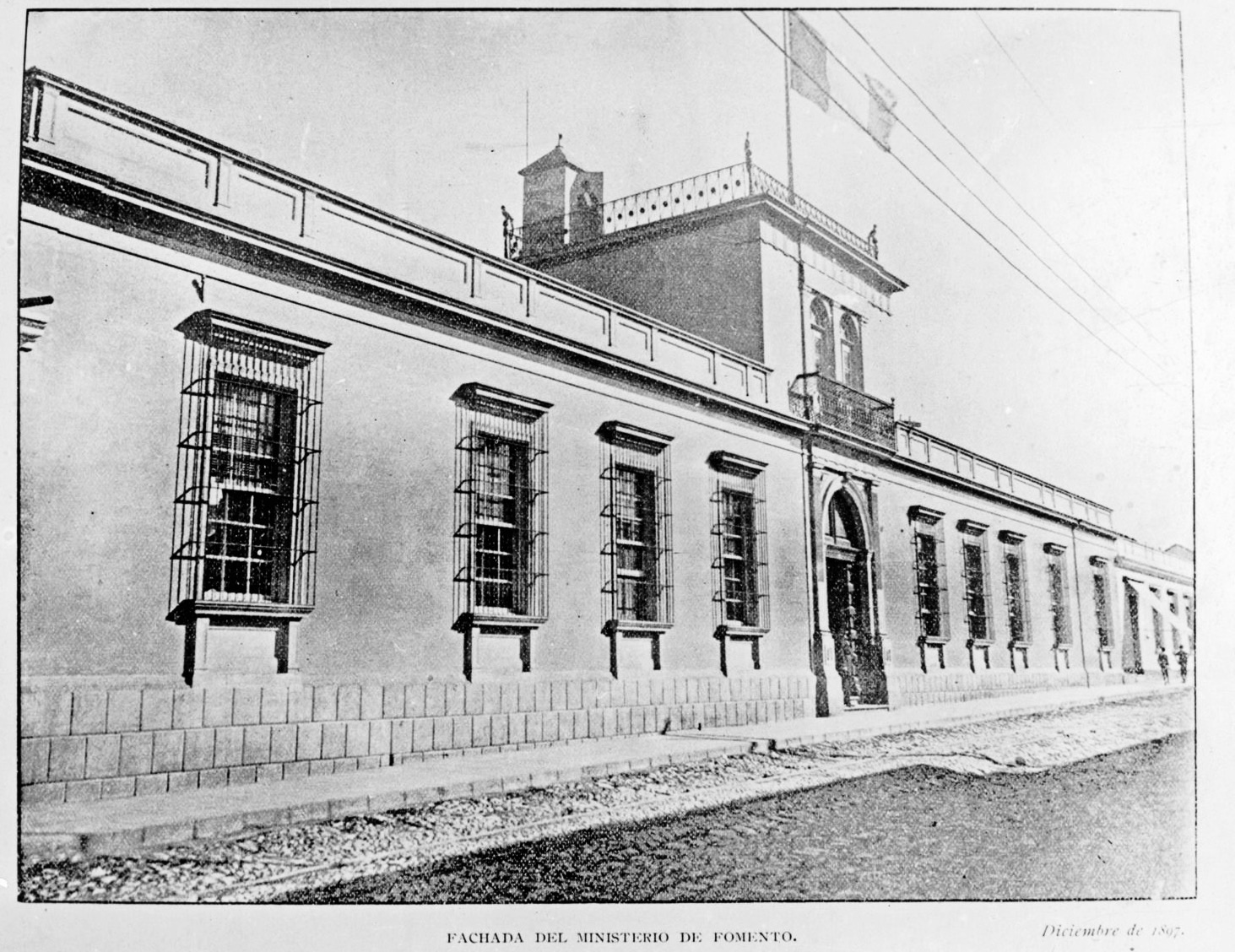 Ministerio de Fomento en 1897 en la Ciudad de Guatemala.